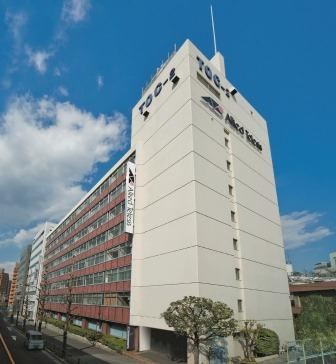 アライドテレシス本社 第2TOCビル